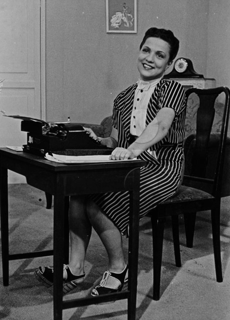 A cantora e atriz Dircinha Batista em Banana da Terra de 1939.